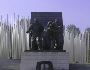 5.18기념공원